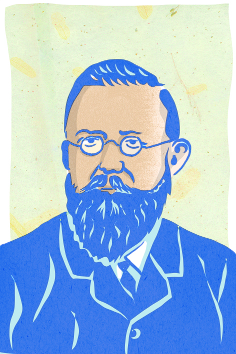 Phantasiebild von Michael Kuoni (1839–1891), Zeichnung von Andrea Caprez